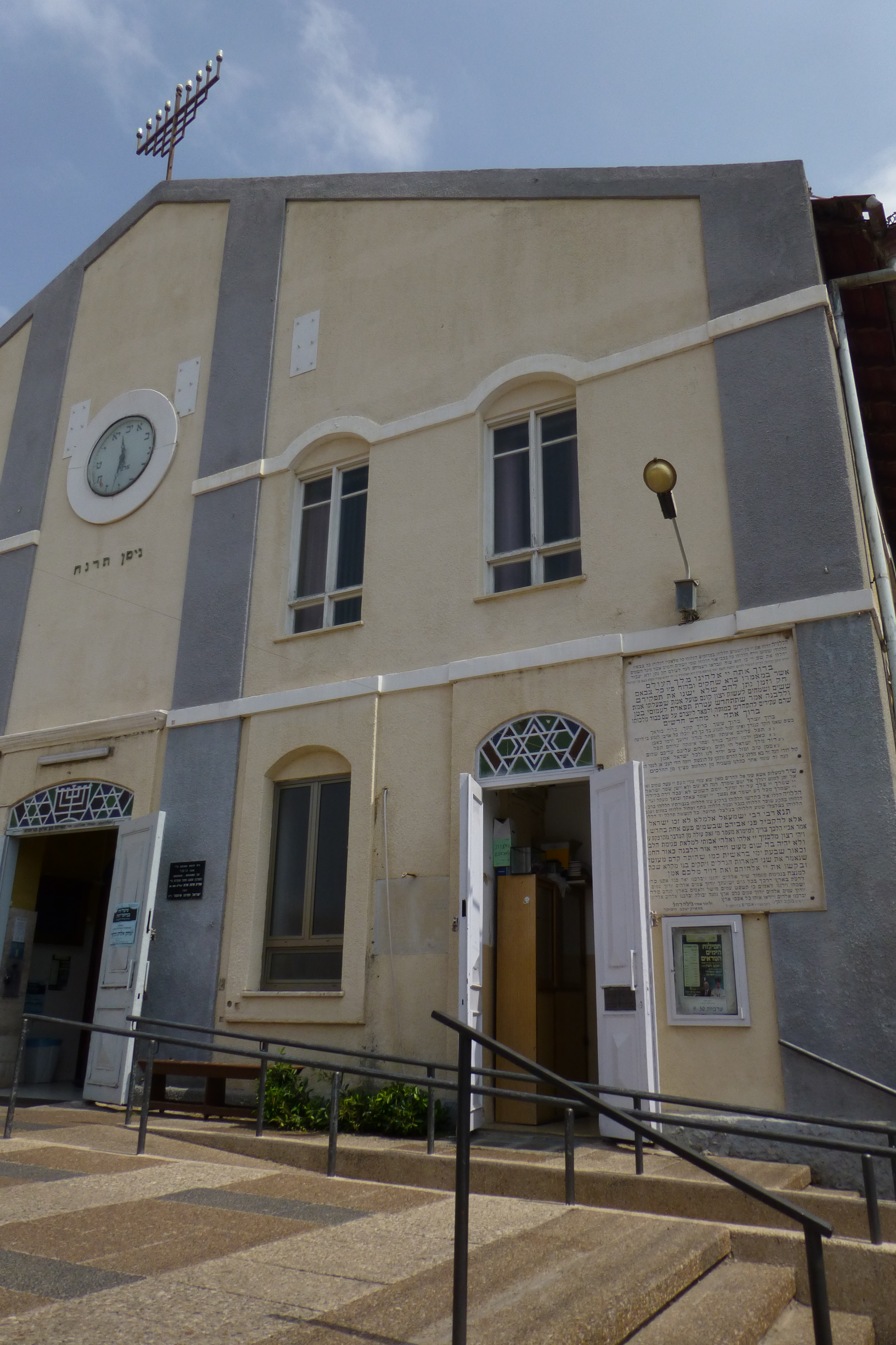 בית הכנסת הגדול על שם יעקב רוטשילד. הוקם מכספי התרומות של אייזיק מלוקאץ והברון רוטשילד.